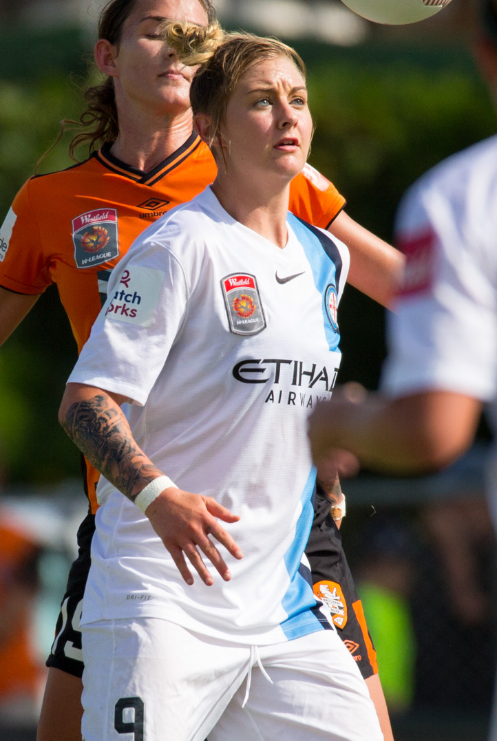 Larissa Crummer